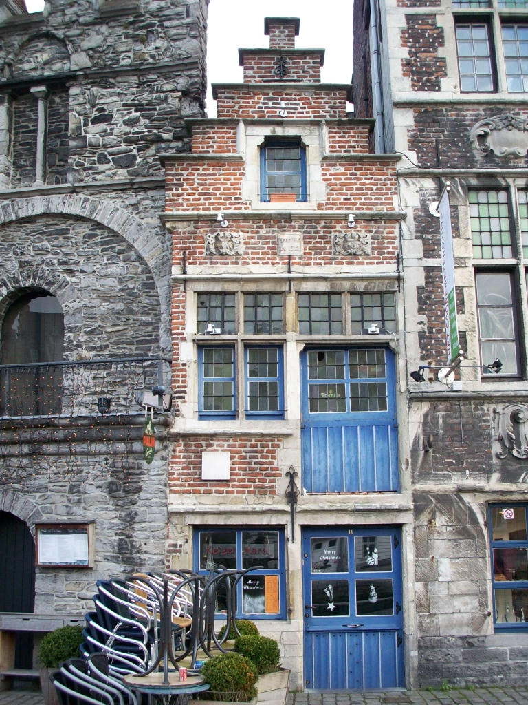 Huis op de Gentse Graslei